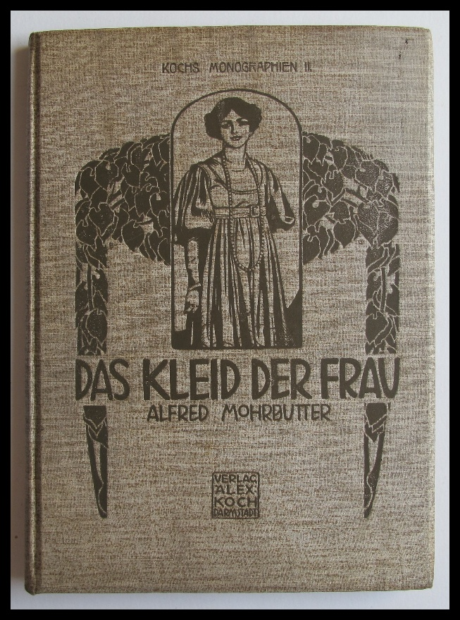 Buchtitel "Das Kleid der Frau" von Alfred Mohrbutter